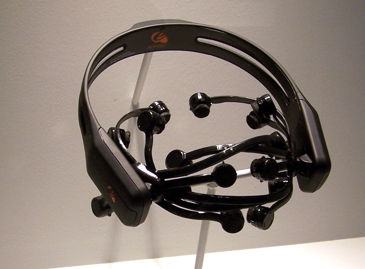 Casque Emotiv pour électroencéphalographie conçu par la société Epoc. Ce casque a été exposé à la biennale du design de Saint-Étienne 2015.